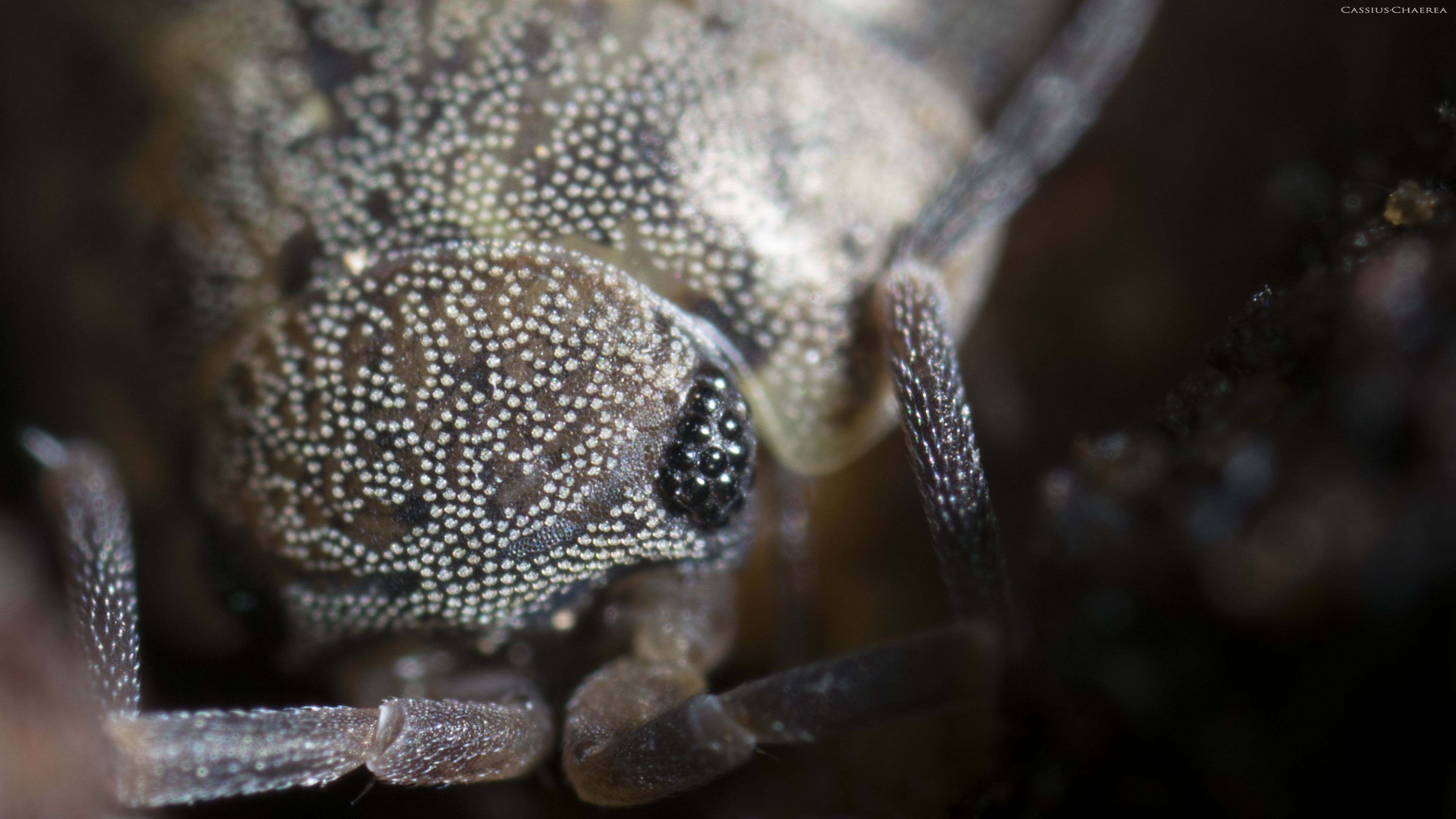 korýšovitý suchozemský druh